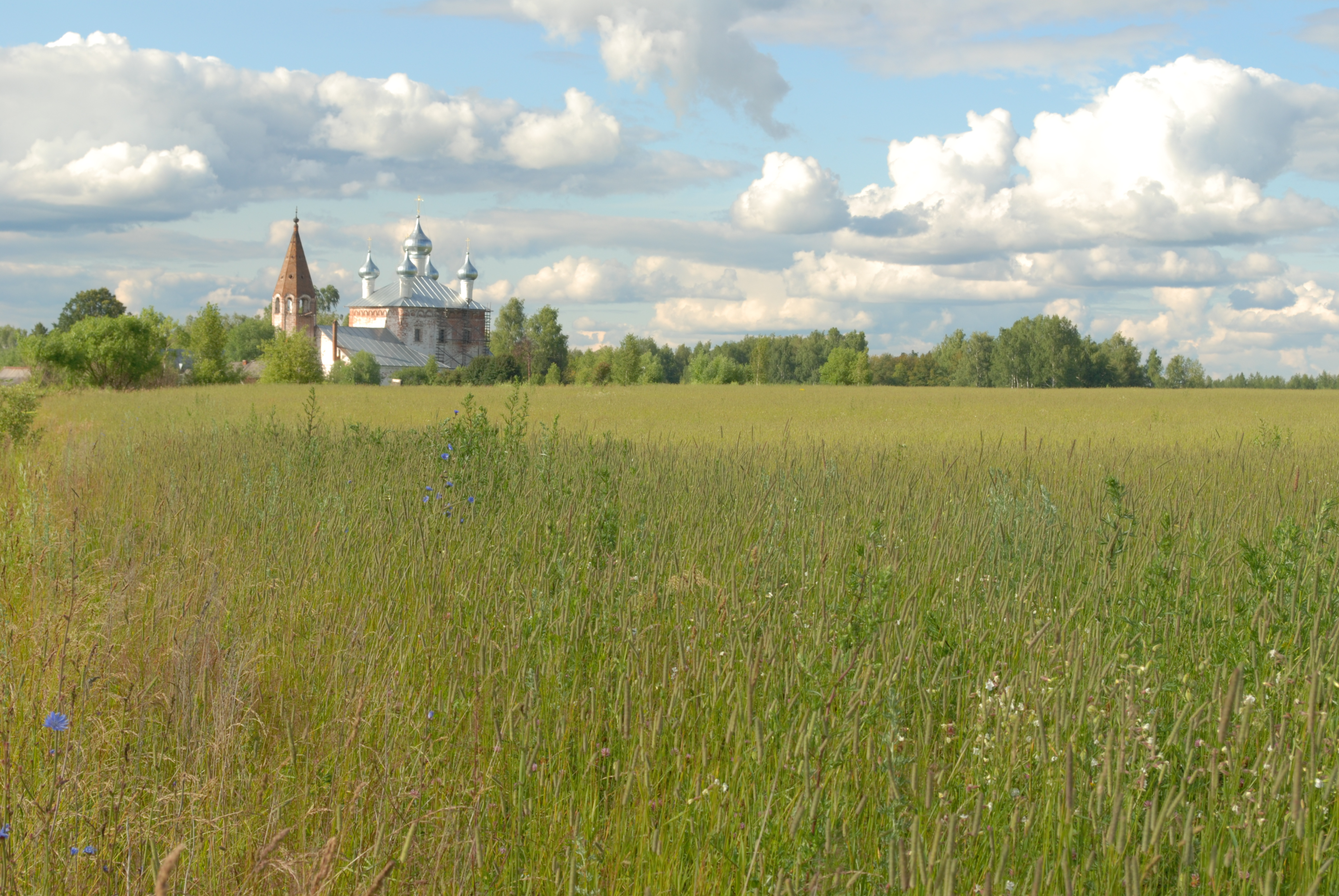 Церковь иконы Божией Матери Казанской (церковь Казанская) (Владимирская область, Ковров, село Малышево)